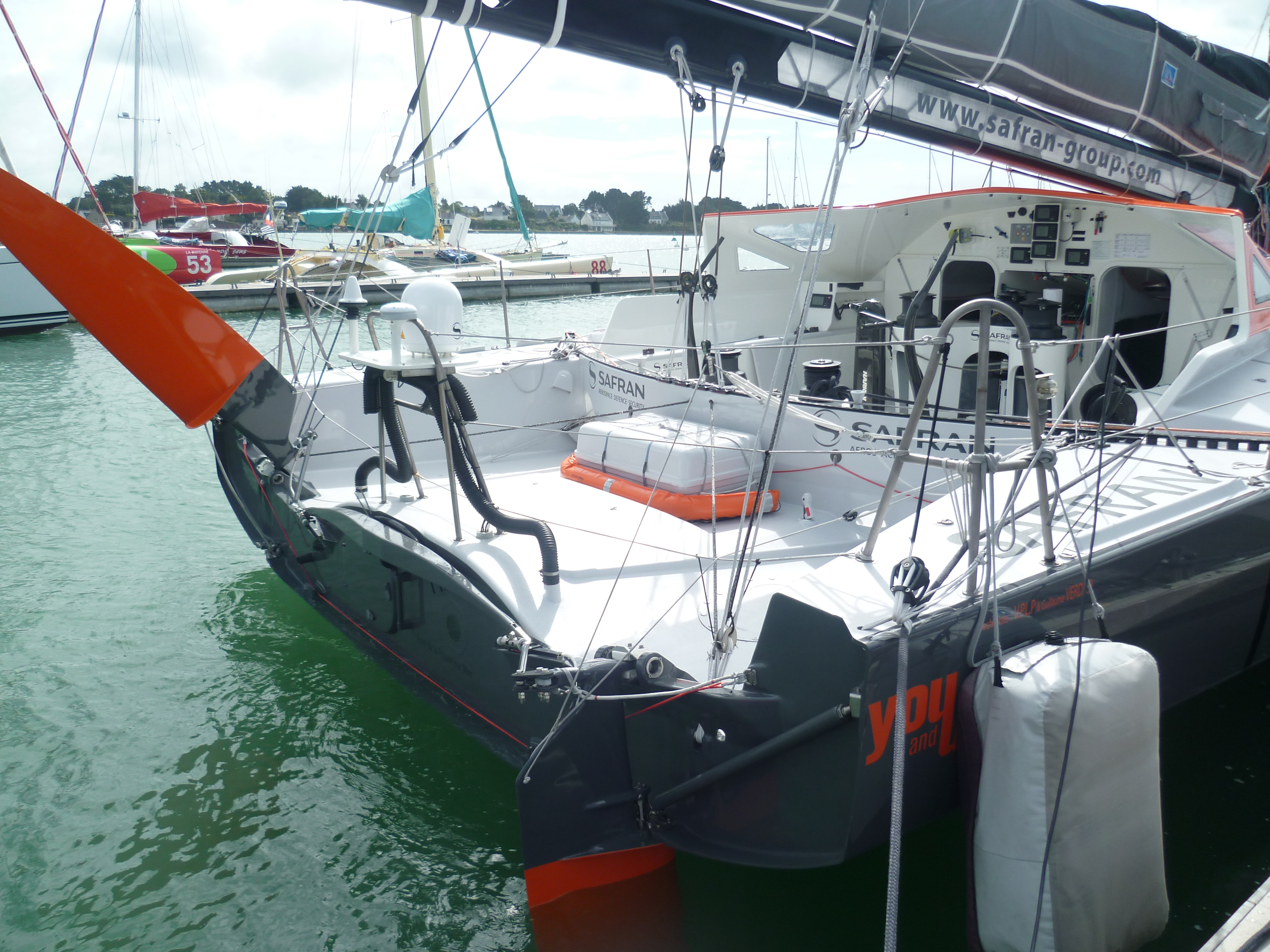 Cockpitdu 60 pieds IMOCA Safran à la Trinité-sur-Mer.